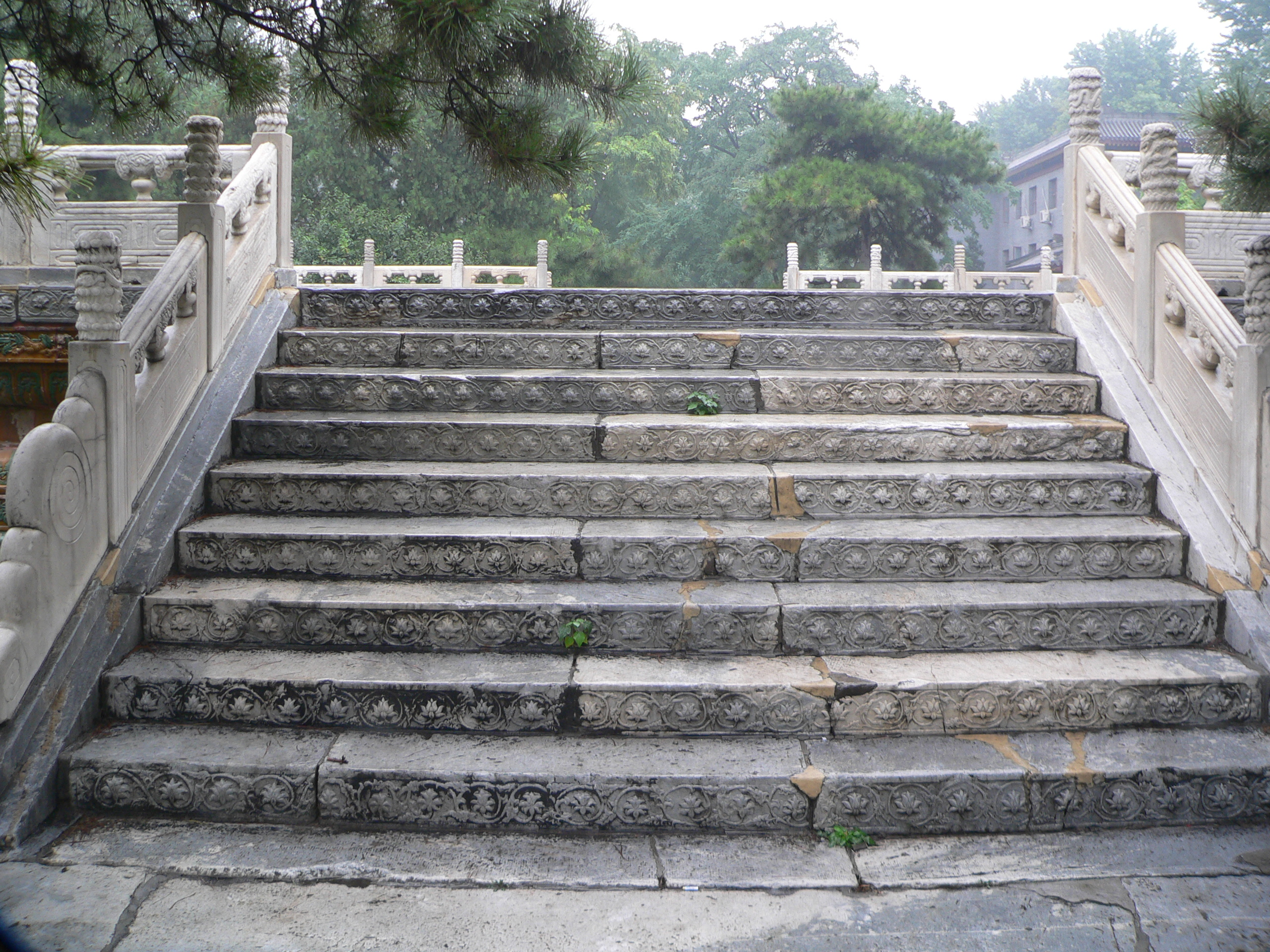 北京先农坛观耕台汉白玉台阶 拍摄